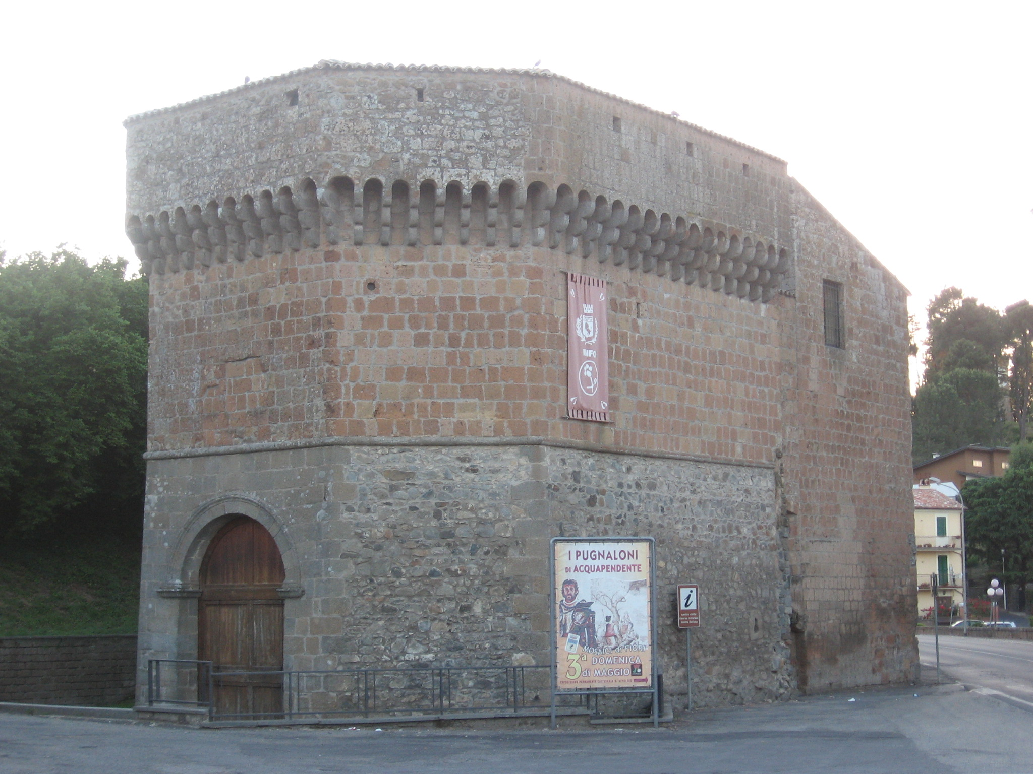 Antica torre del paese